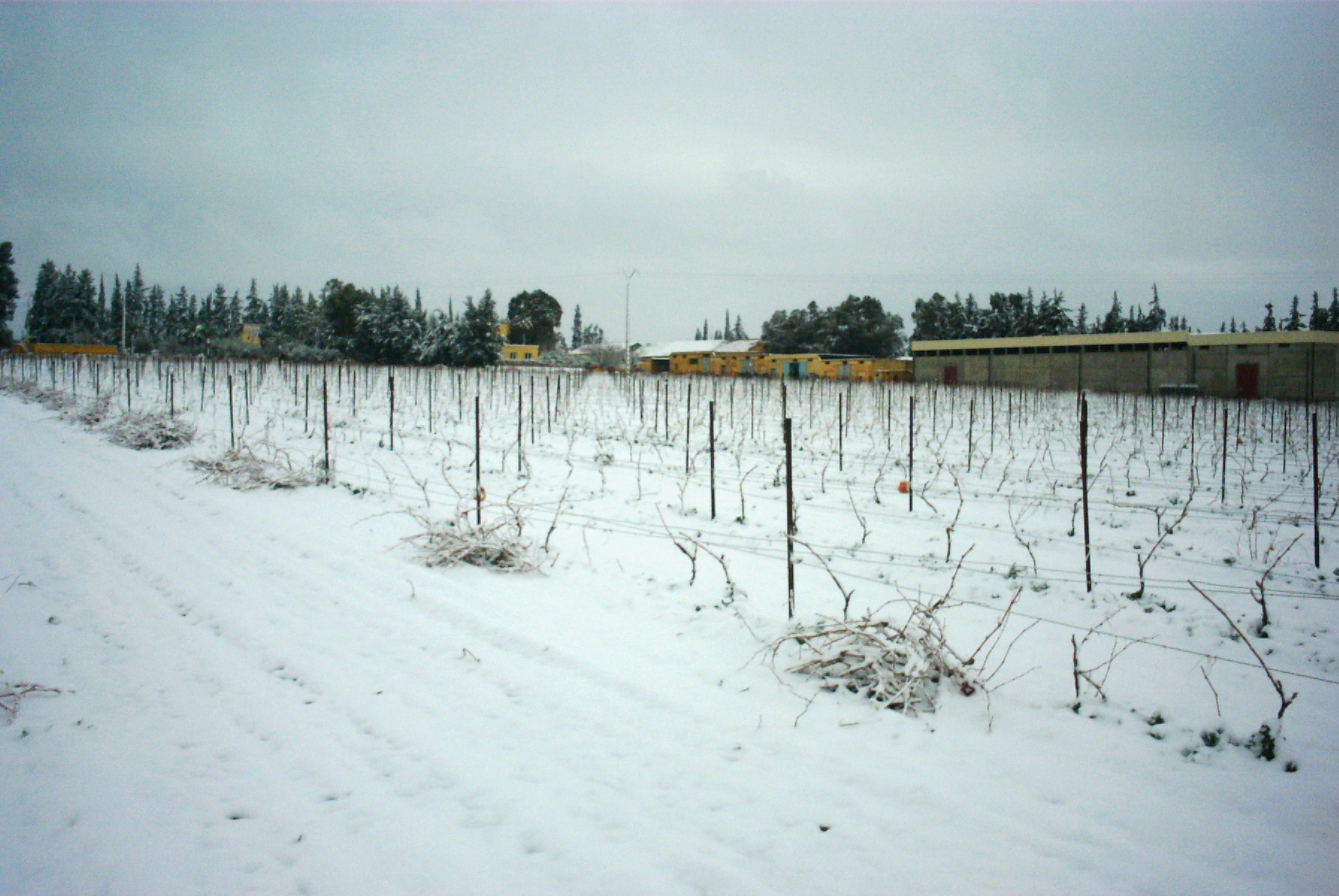 Le Domaine de la Zouina sous la neige (2005)